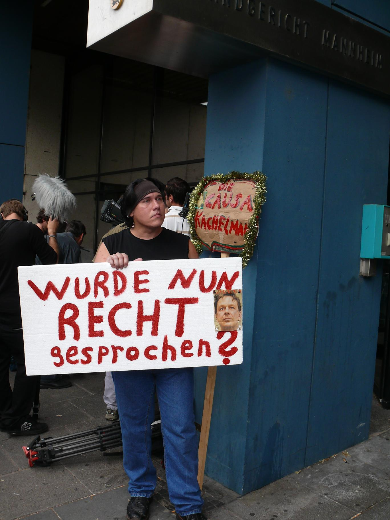 Mahner nach dem Urteil im Kachelmannprozess am Landgericht Mannheim